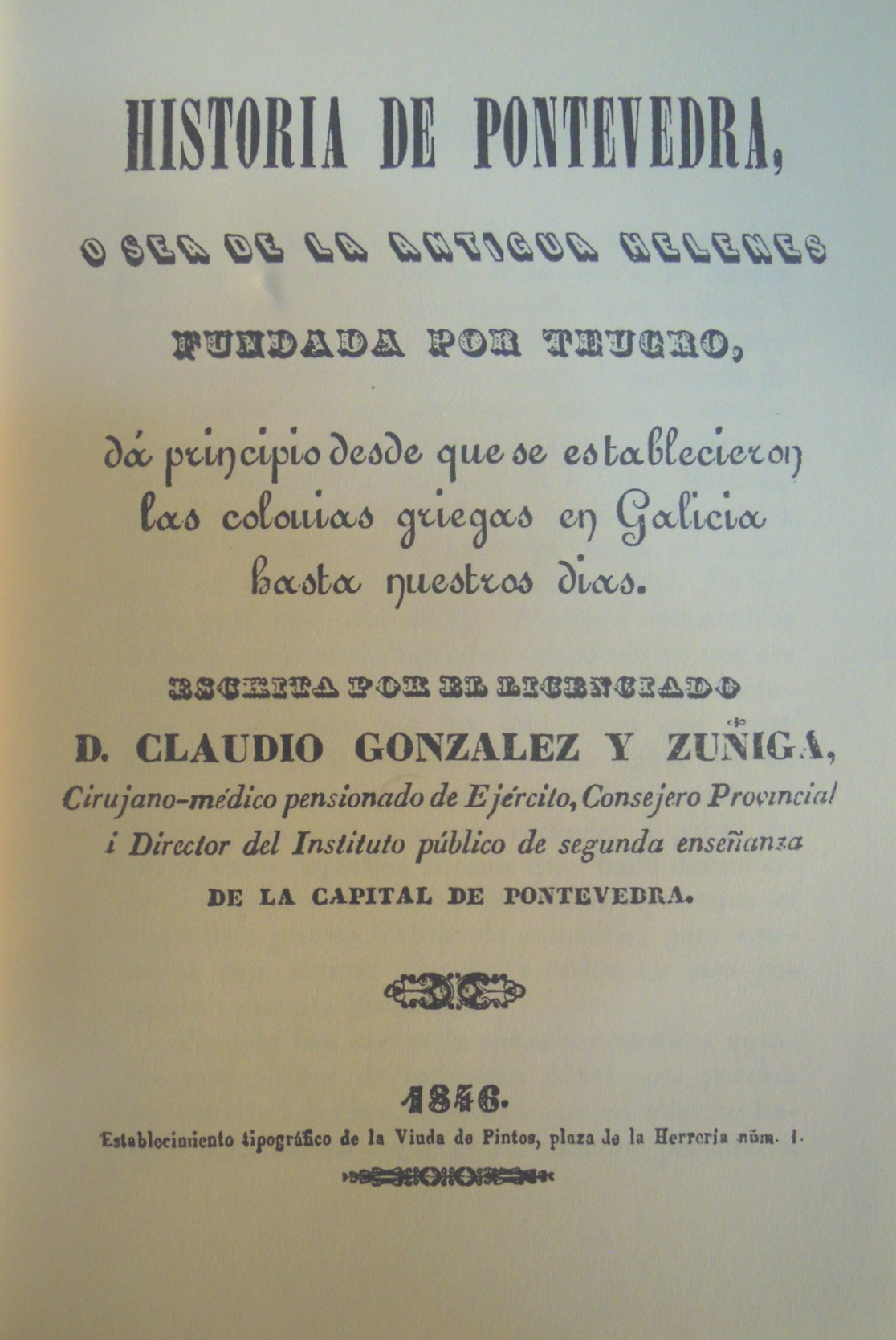 Portada facsímile da primeira edición de Historia de Pontevedra (1846), de Claudio González Zúñiga, co seguinte texto: HISTORIA DE PONTEVEDRAO SEA DE LA ANTIGUA HELENESFUNDADA POR TEUCRO,dá principio desde que se establecieronlas colonias griegas en Galiciahasta nuestros días.ESCRITA POR EL LICENCIADOD. CLAUDIO GONZALEZ Y ZUÑIGA,Cirujano-médico pensionado de Ejército, Consejero Provinciali Director del Instituto público de segunda enseñanzaDE LA CAPITAL DE PONTEVEDRA.1846Establecimineto tipográfico de la Viuda de Pintos, plaza de la Herrería núm. 1